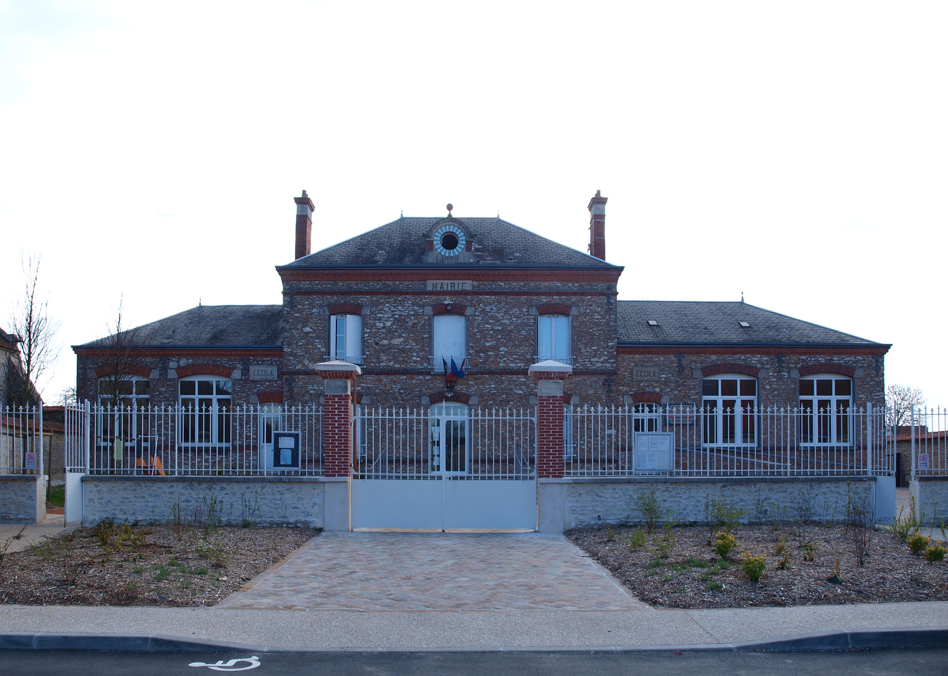 Authon-la-Plaine (Essonne, France) ; mairie.